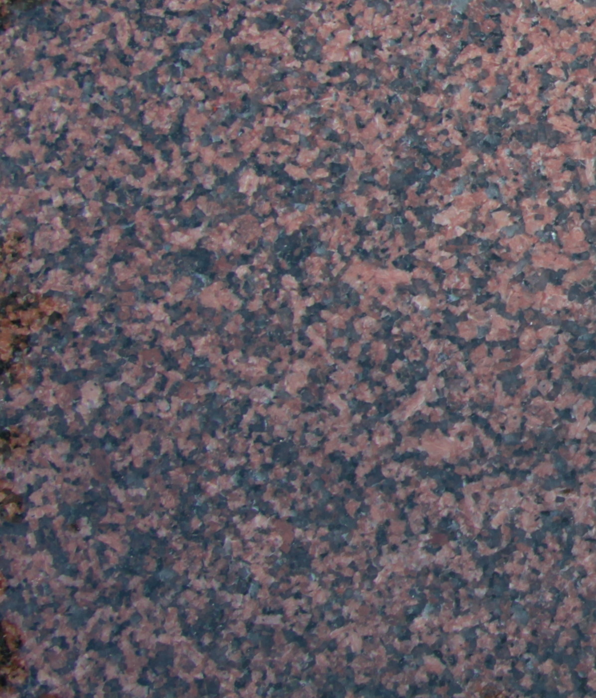 Quimbra (poliert): Granit aus Südschweden (Muster ca. 8x8cm)